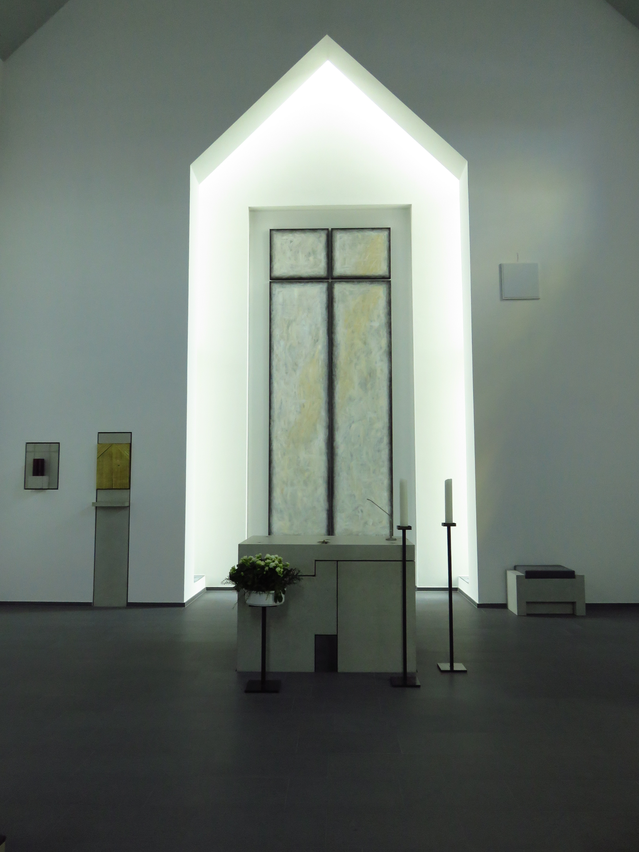 Bild aus der Kapelle St. Lambertus in Immerath (neu)